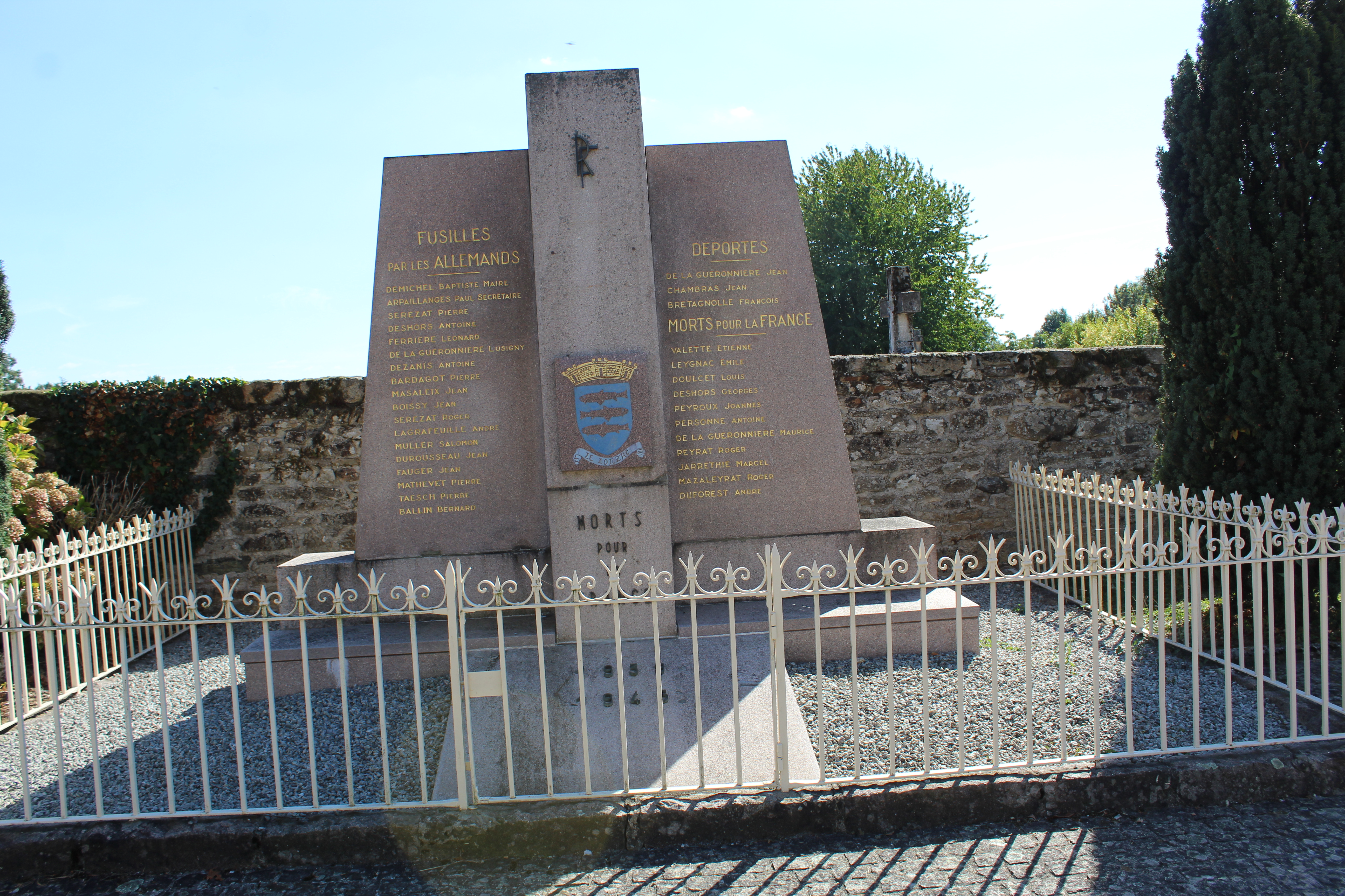 Le monument 39-45